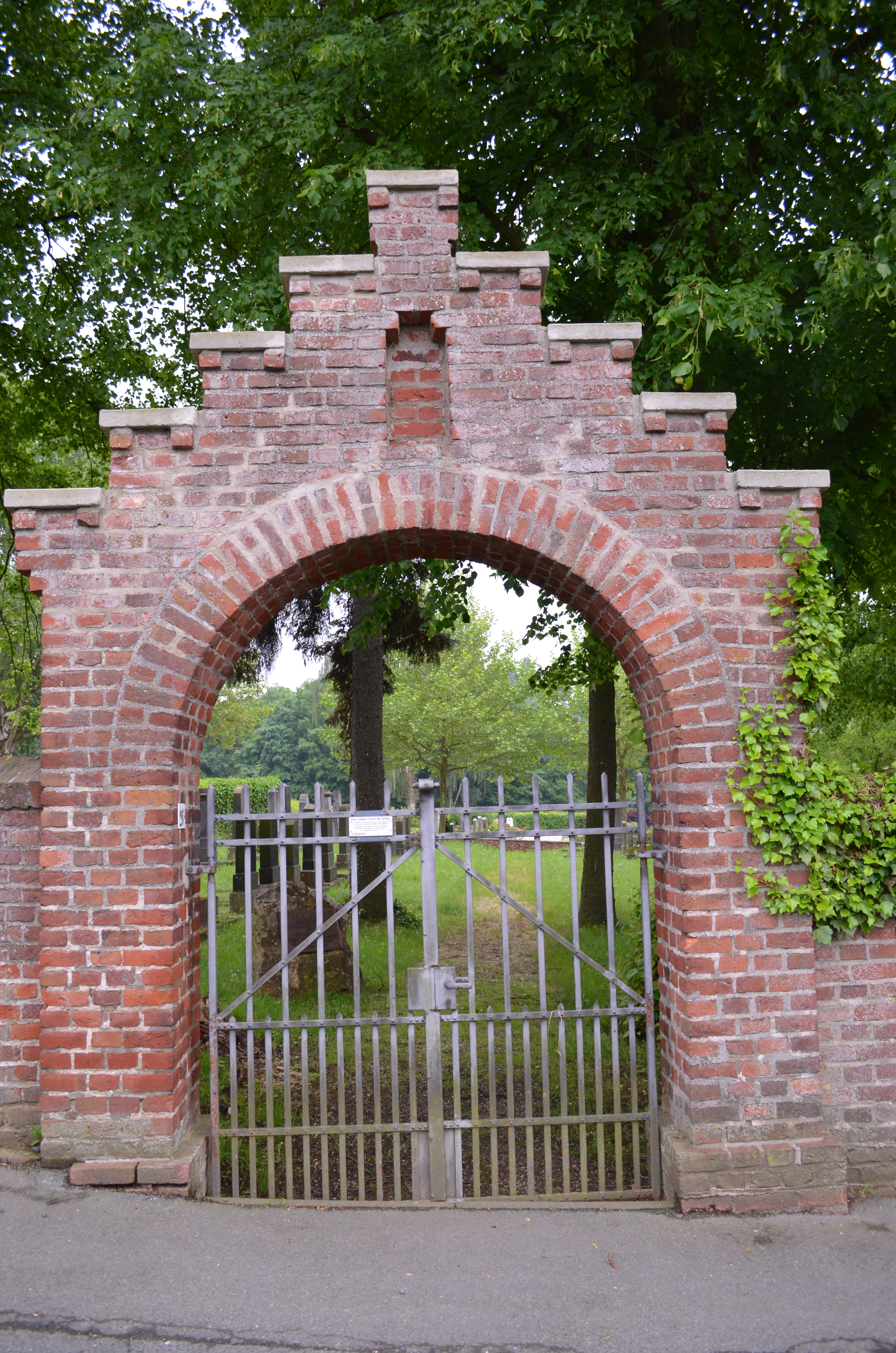 Bad Camberg, Neuer jüdischer Friefhof, Tor